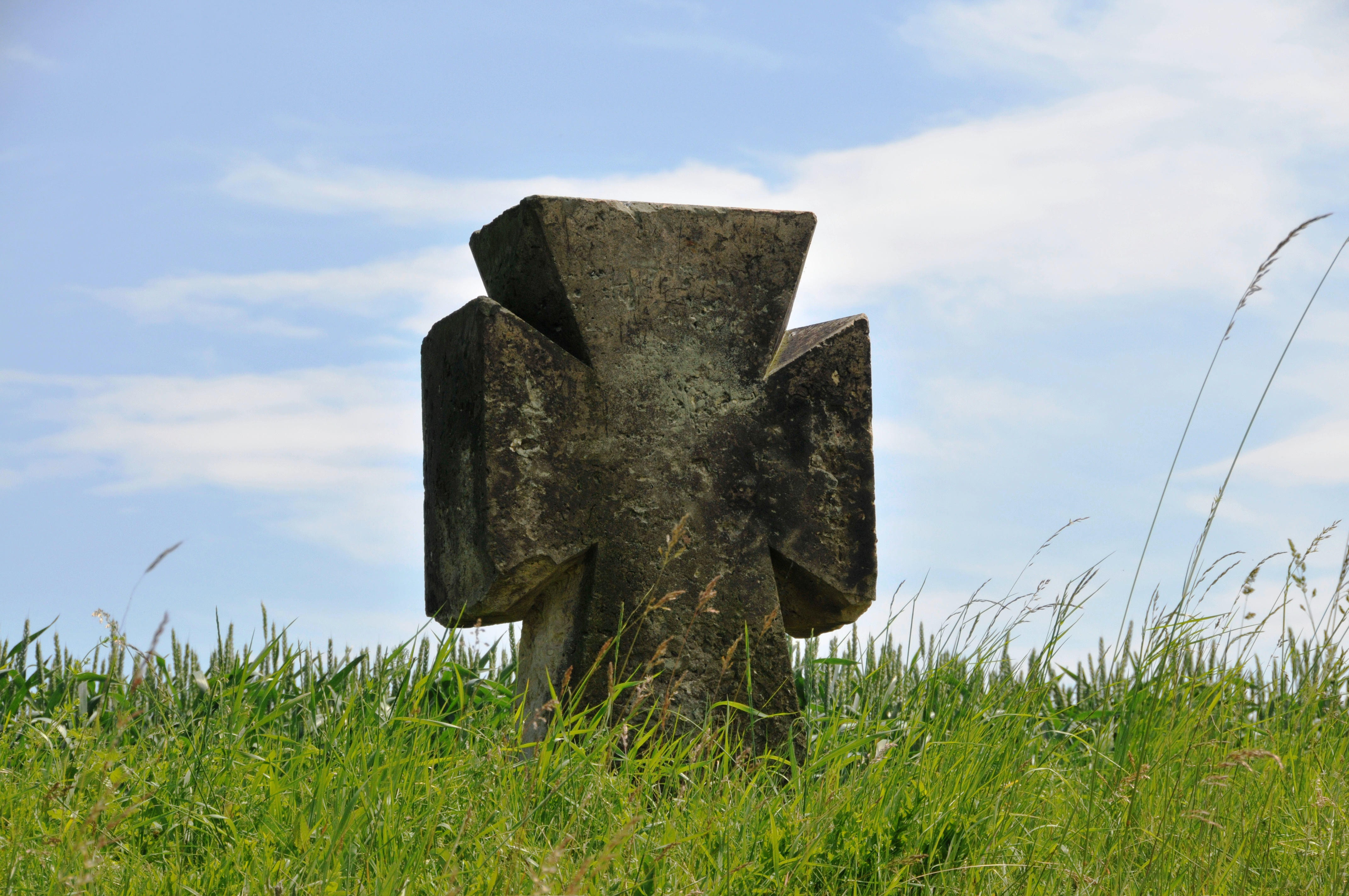 Apfelstädt, Kreuz an der Sülzenbrücker Straße